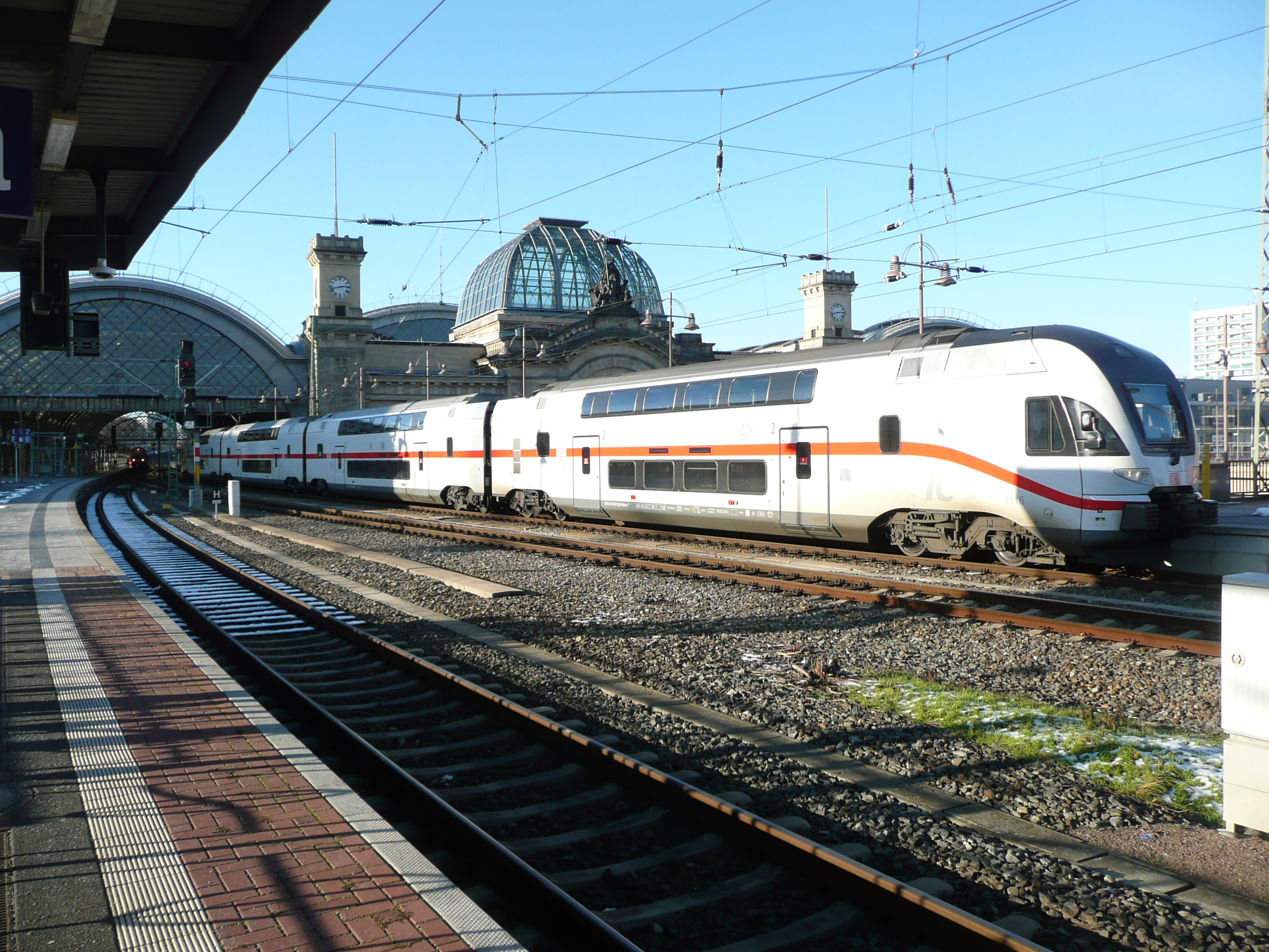 Stadler KISS2 vor IC2 Rostock-Dresden in Dresden Hauptbahnhof